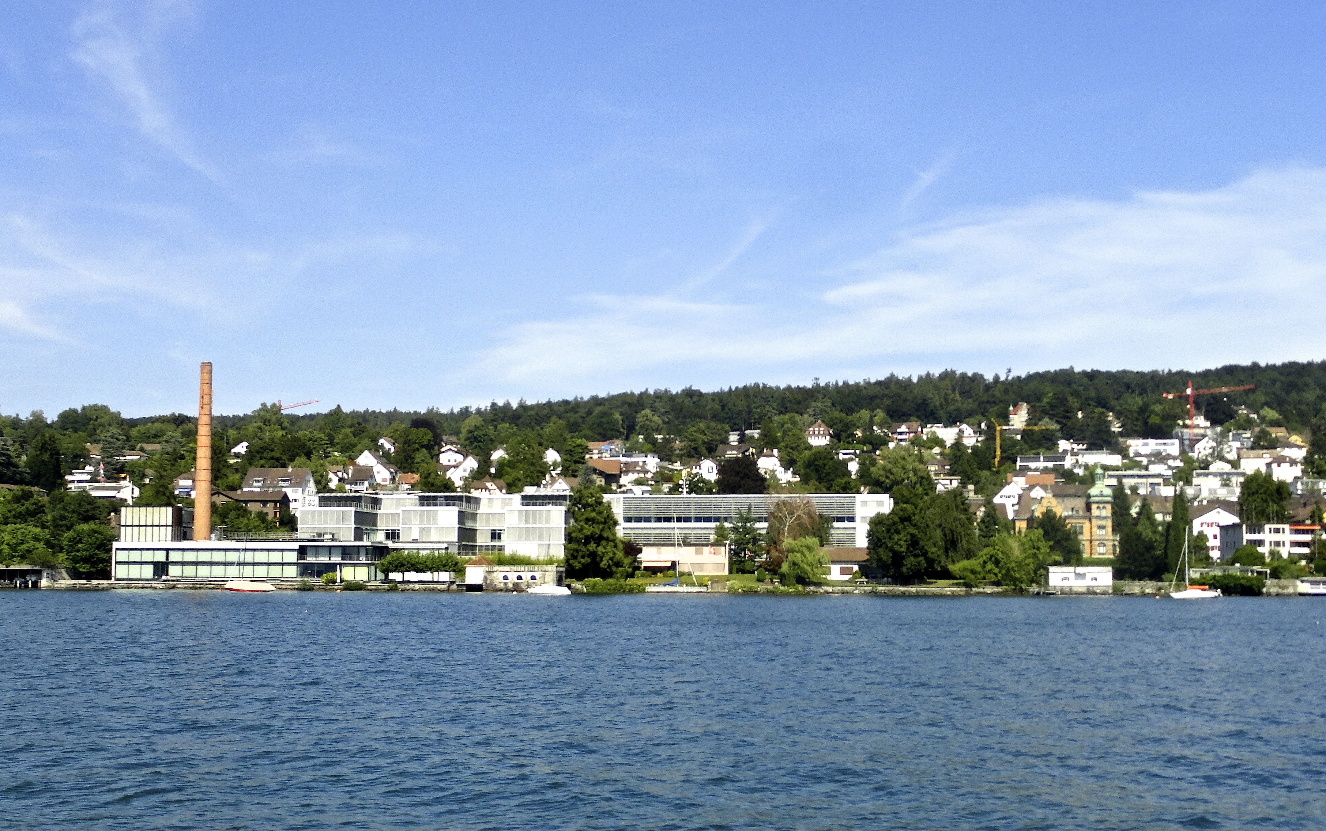 Goldbach ZH